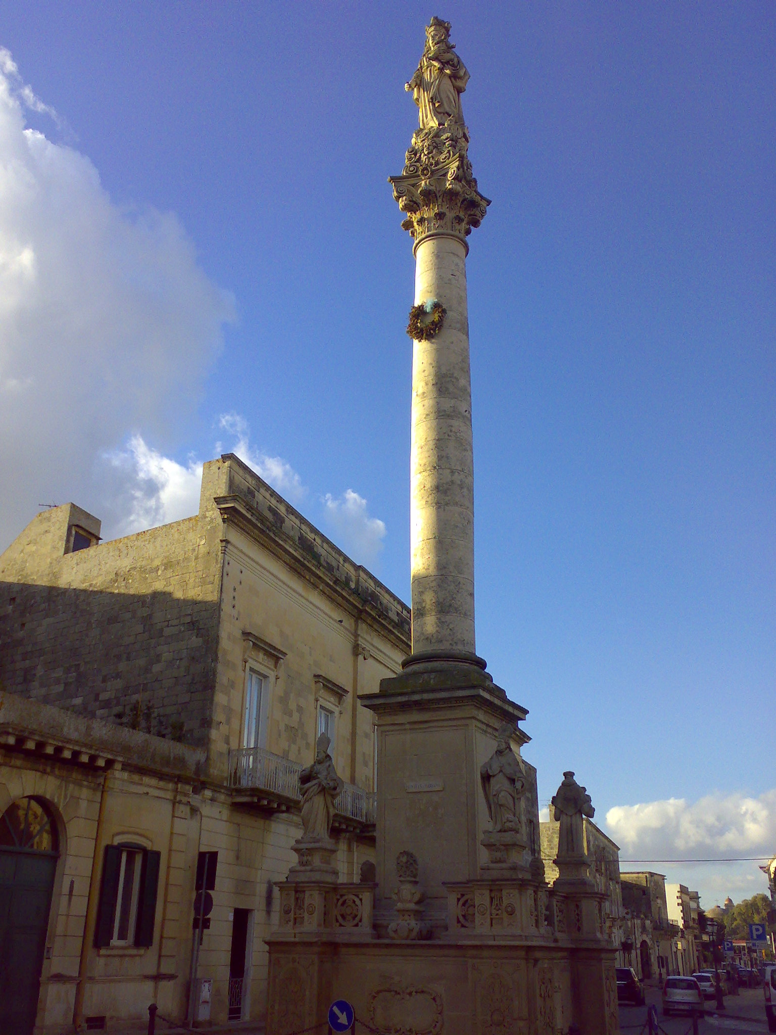 Colonna Madonna delle Grazie Maglie, provincia di Lecce